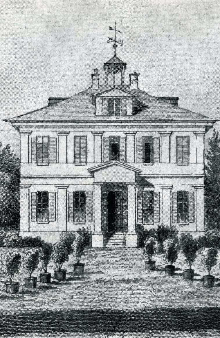 Rauchsches Landhaus am Steinweg in Heilbronn. Lithographie (Ausschnitt)